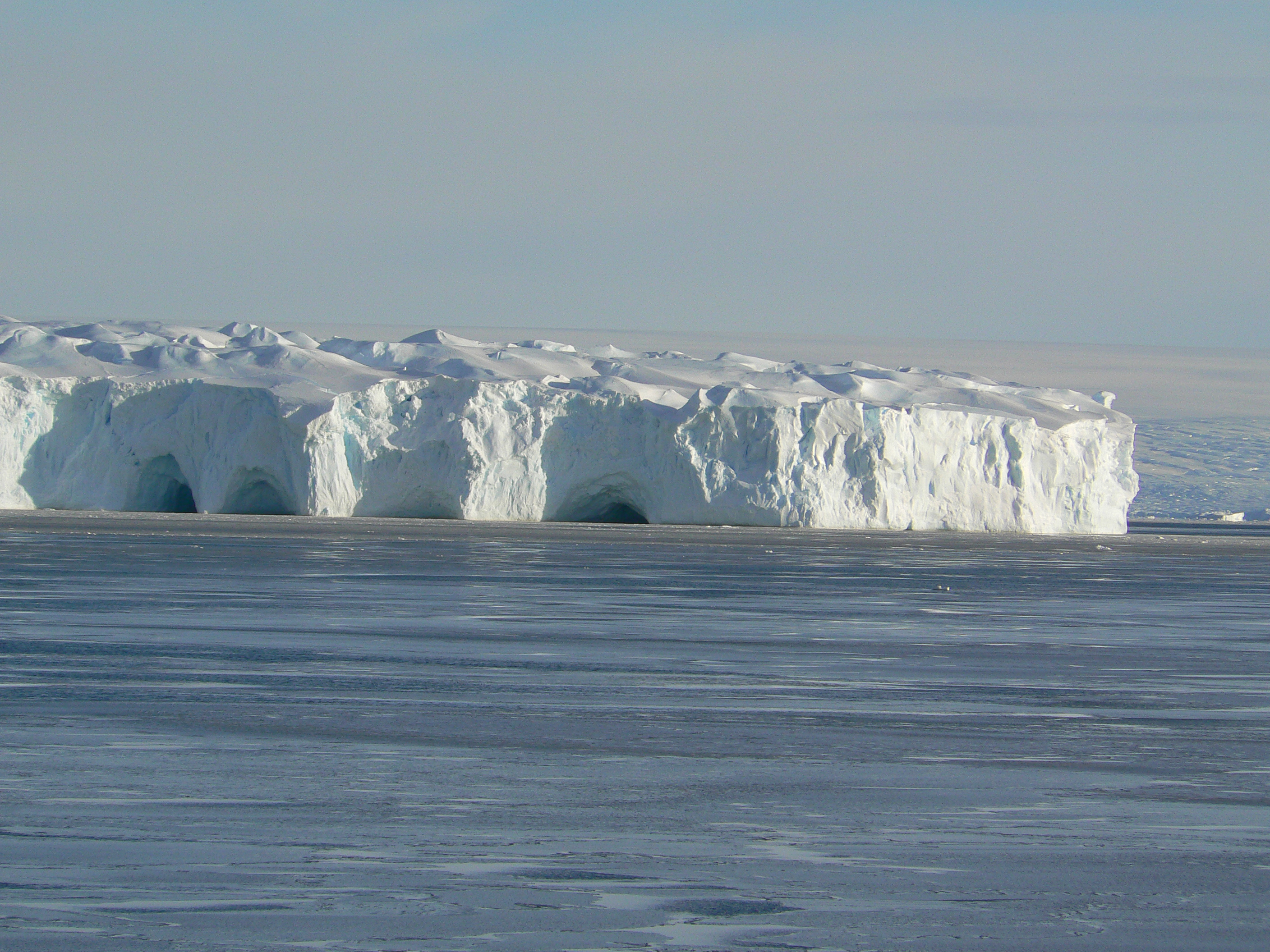 Норы / Holes